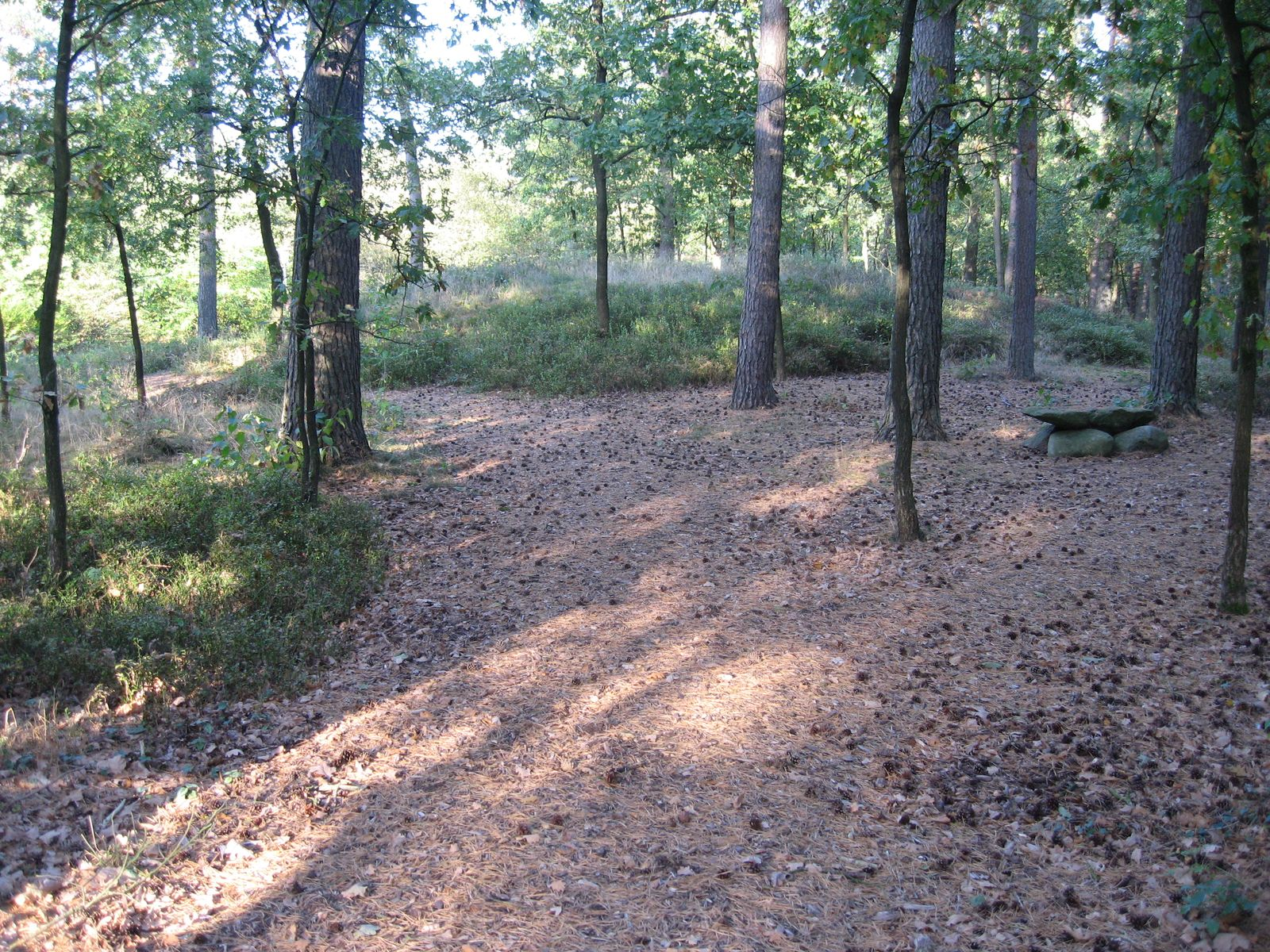 Vorgeschichtliche Grabhügel in Kakenstorf